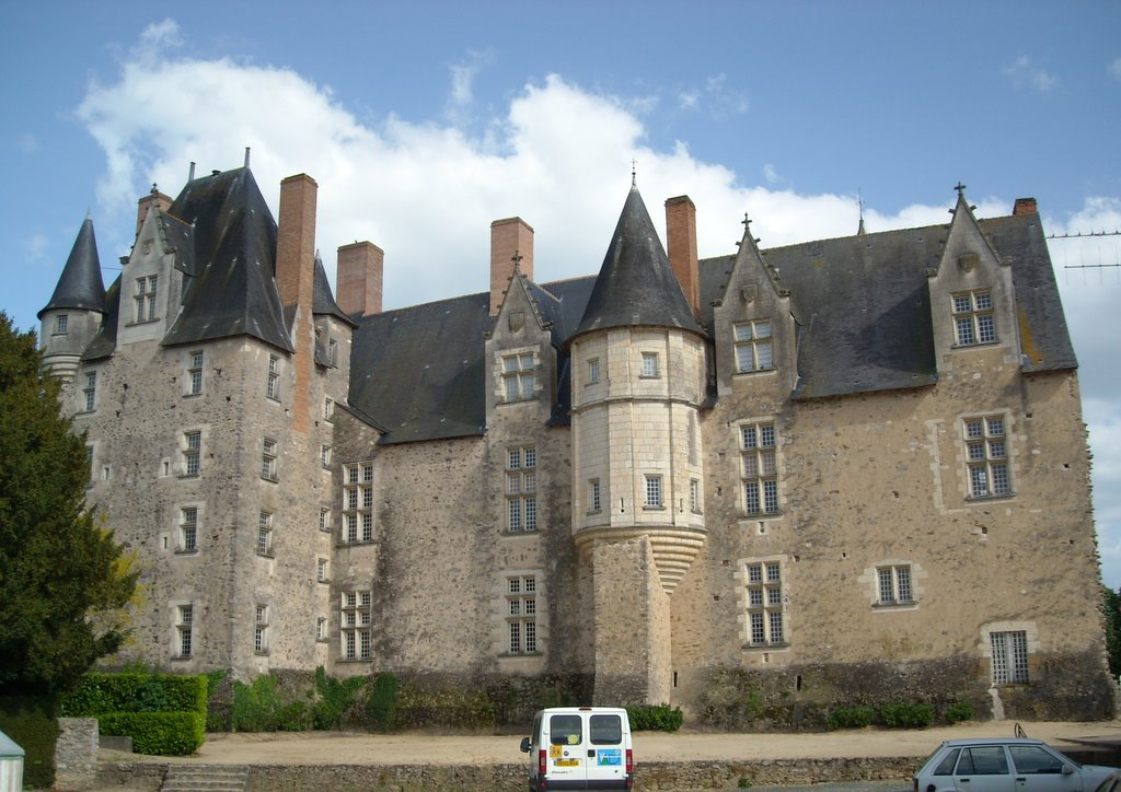 Château de Baugé. Façade Nord